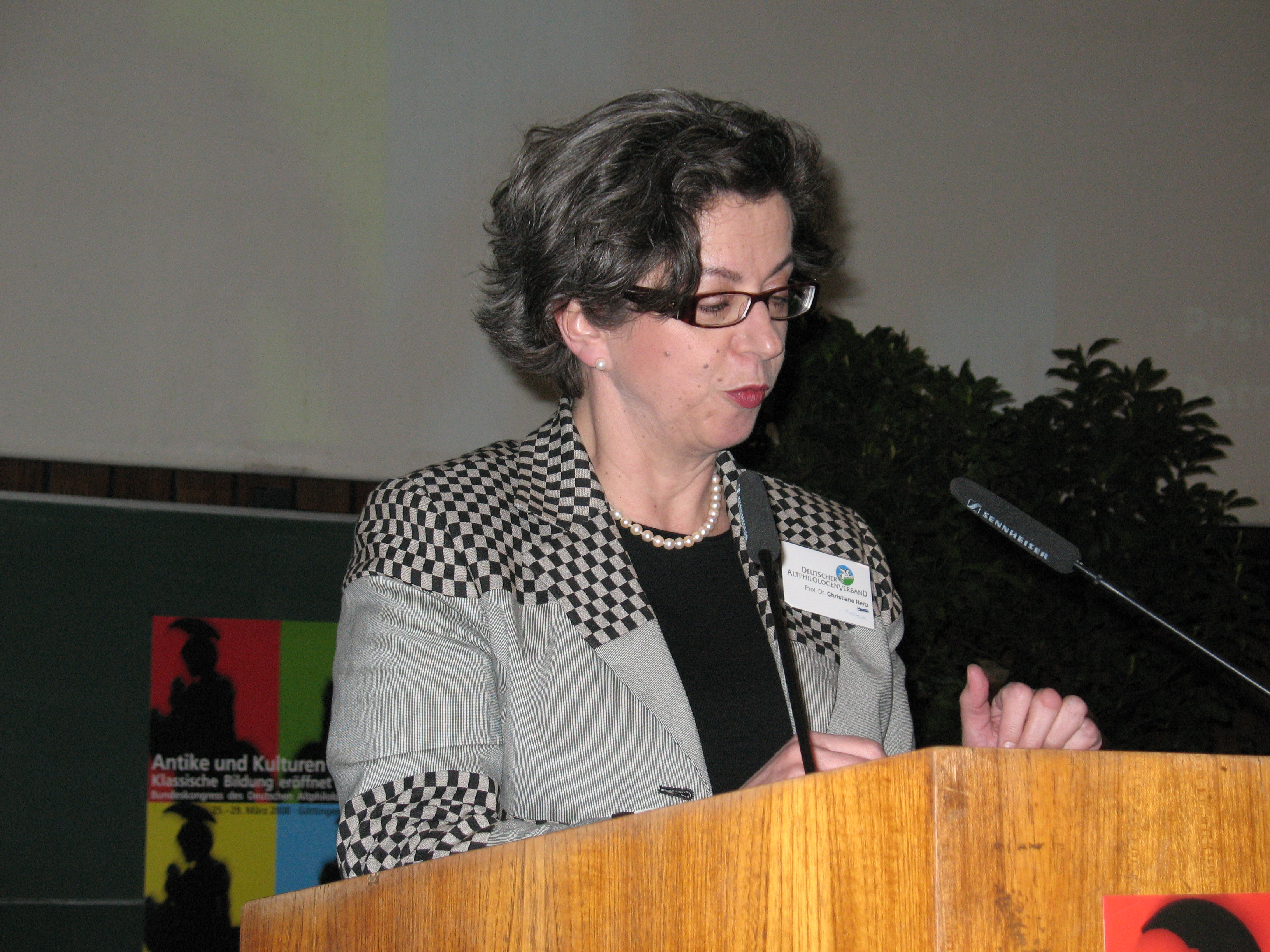 Prof. Dr. Christiane Reitz, Vorsitzende der Mommsen-Gesellschaft, bei der Eröffnung des Bundeskongresses des DAV 2008 im ZHG der Universität Göttingen